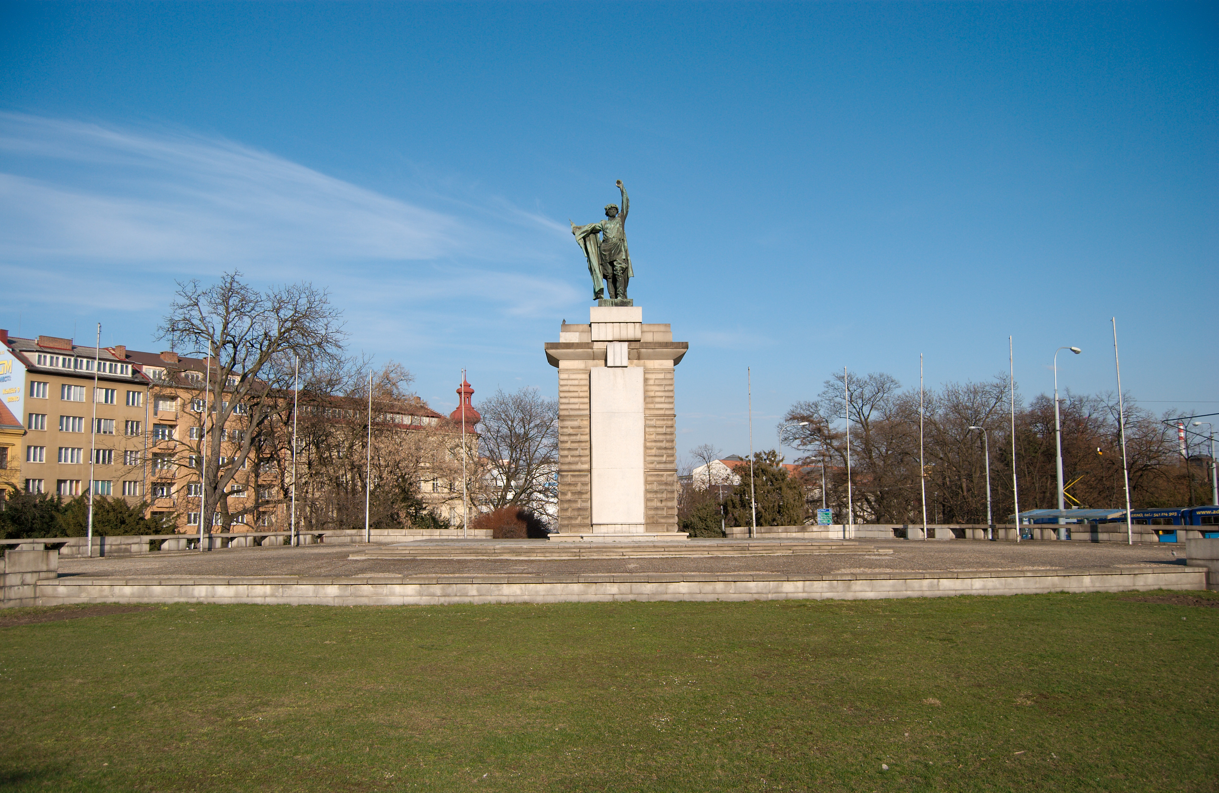 Pomník rudoarmějců na Moravském náměstí v Brně